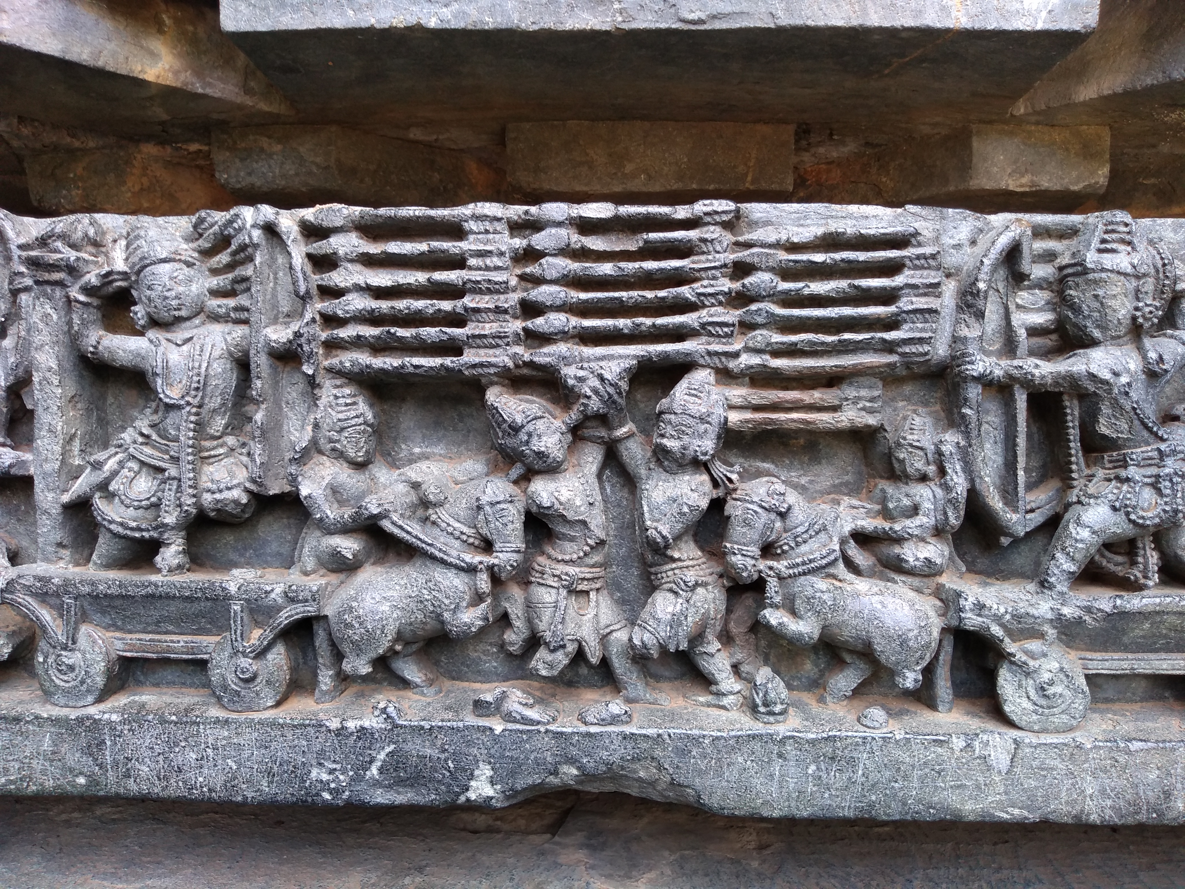 Mahabharata War